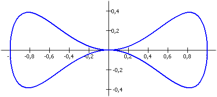 Doppia goccia d'acqua Curva Matematica